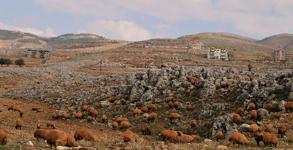 West Bekaa (Lebanon)